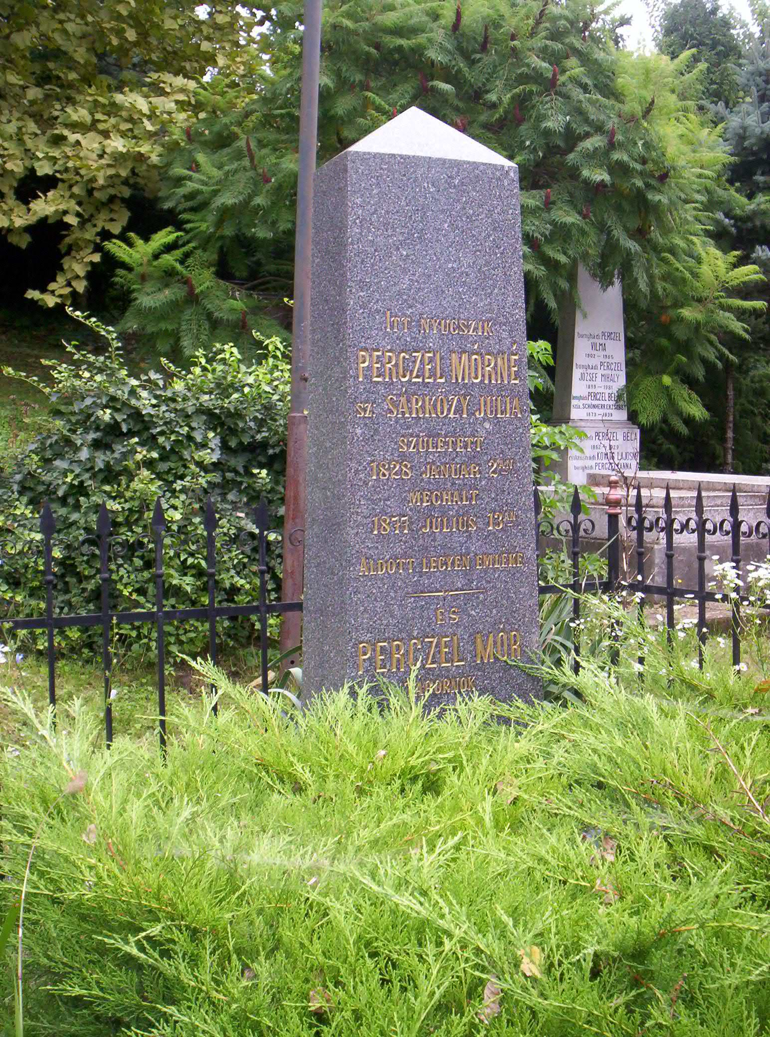 Perczel Mór tábornok sírja Bonyhádon az Ermel-Vojnits kápolna közelében. Bonyhád, Úri-hegy/Kálvária-domb – photo taken by uploader User:Csanády in 2006. Grave of General Mór Perczel in Bonyhád.